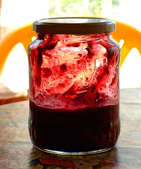 Blackcurrant jam.